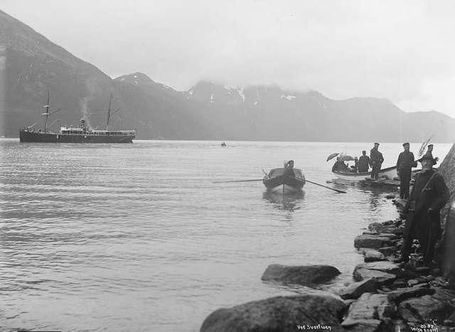 Turistar vert sette på land ved Engabreen. Holandsfjorden.